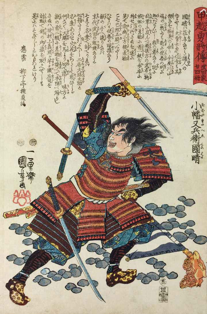 「甲越勇將傳武田家廾四將 ：小山田又兵衛國晴」1848年作